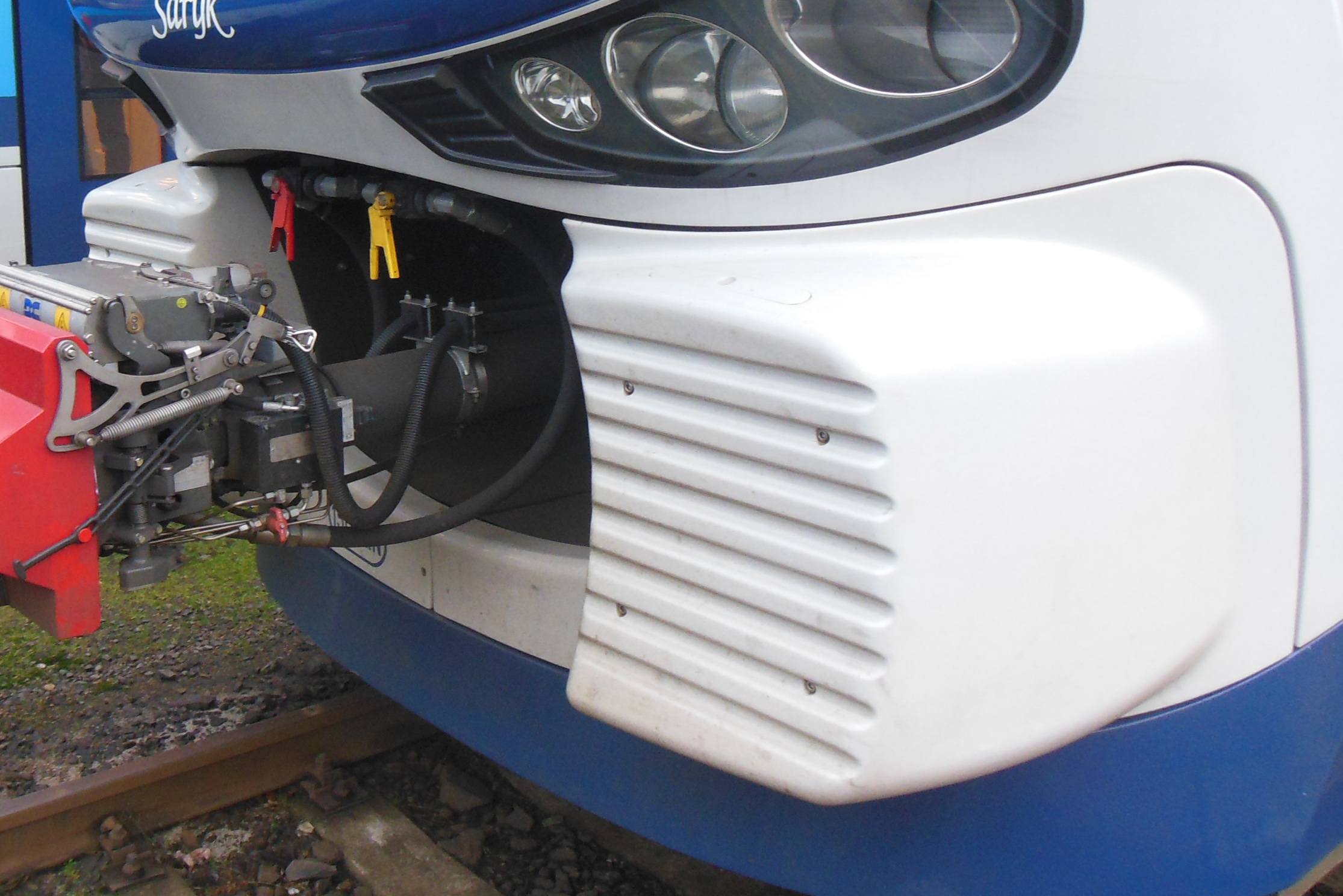 Liberec (okres Liberec). Železniční stanice Liberec, motorová jednotka 844 RegioShark, spřáhlo.